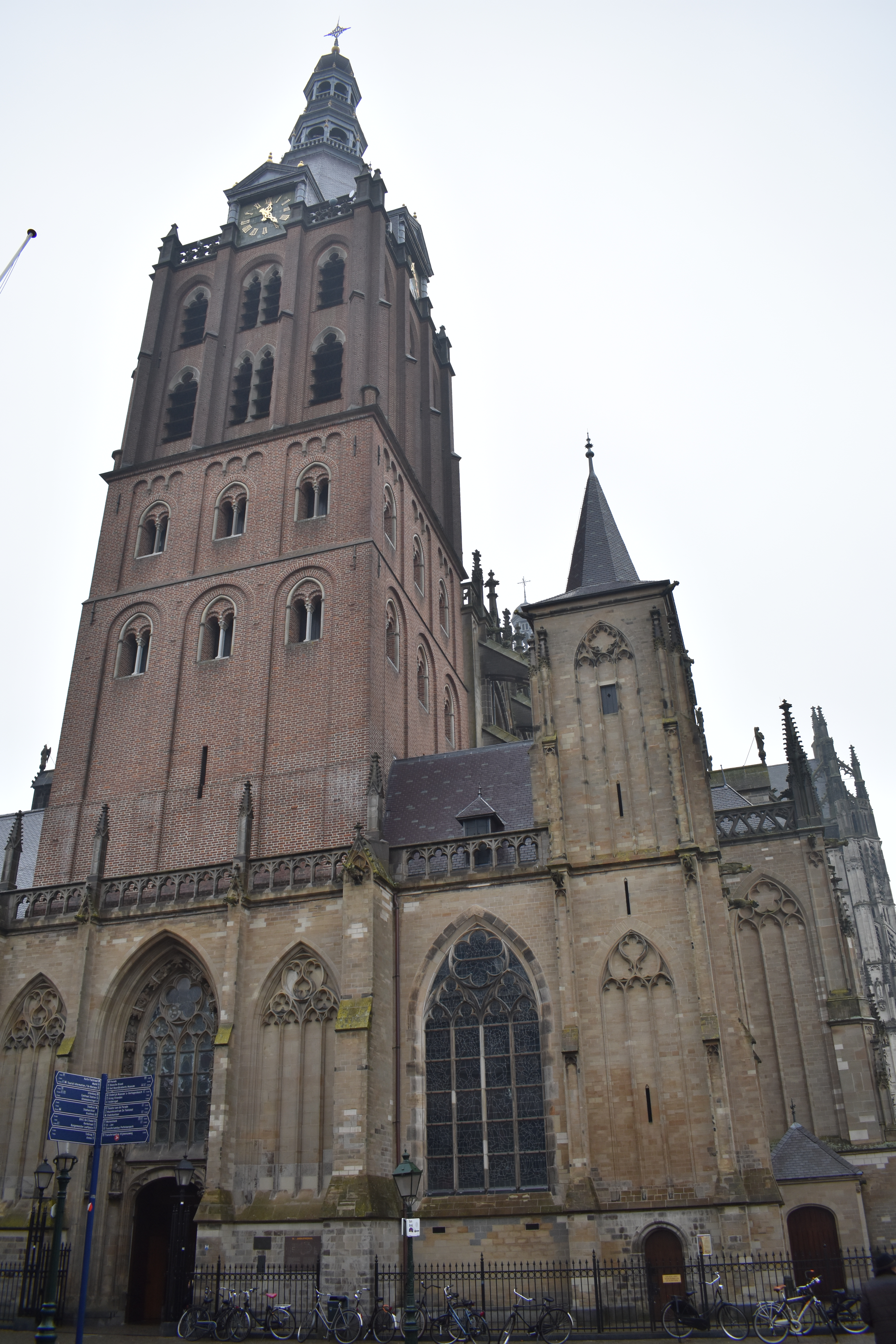 Kathedrale Basiliek van St. Jan Evangelist, Torenstraat 18, 's-Hertogenbosch Wikidata has entry Q2050553 with data related to this item.